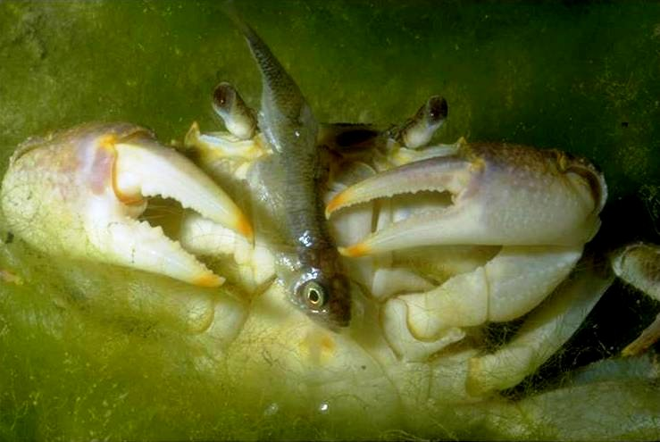 Potamon fluviatile (Herbst, 1785)